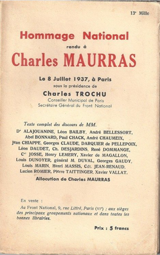 Hommage national rendu à Charles Maurras, Front National 1937, brochure sous la présidence de Charles Trochu. Paris, au Front National, 9, rue Littré, Paris VIe